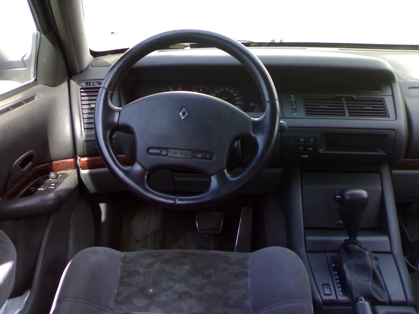 Interior del Renault Safrane.